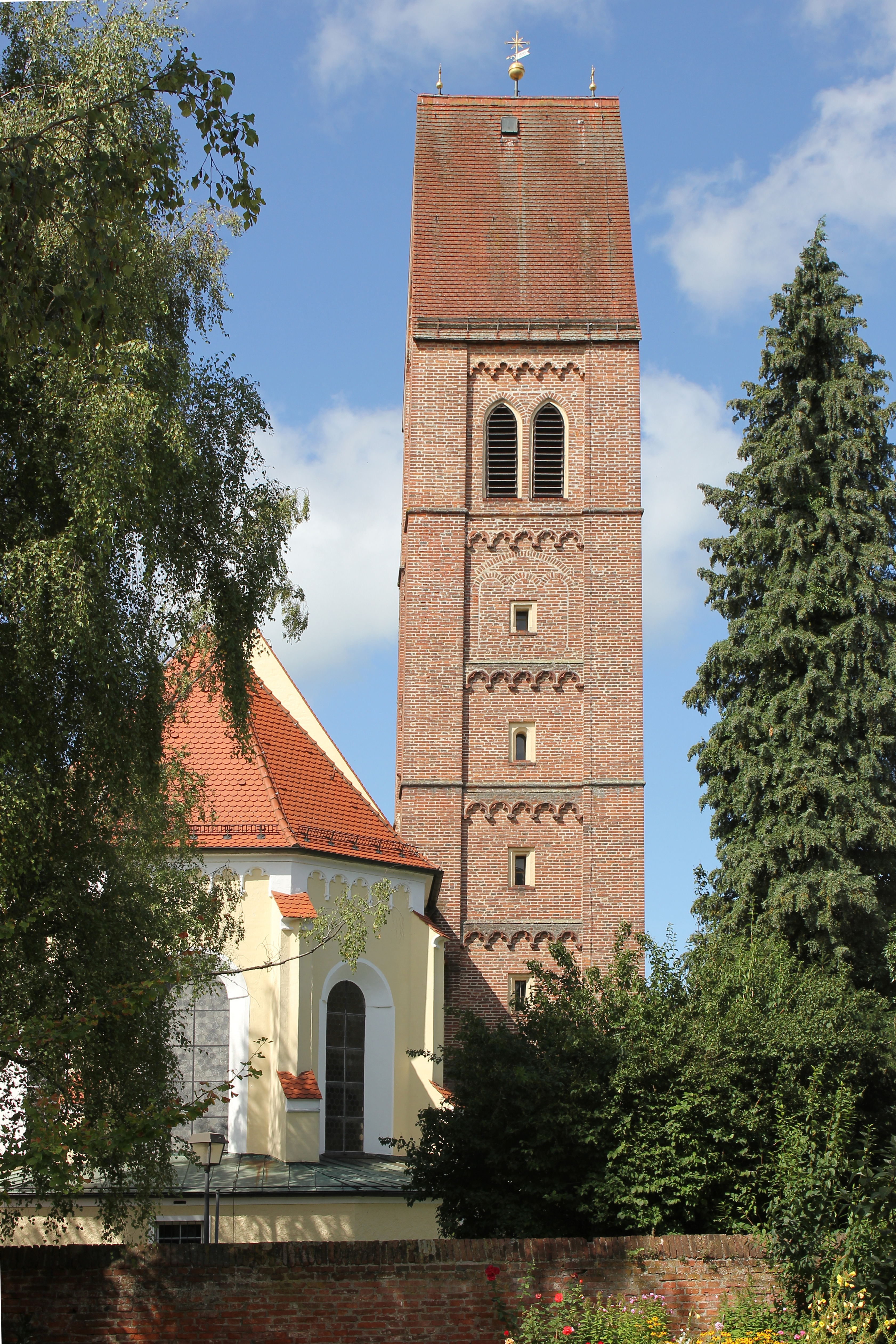 Glockenturm der Pfarrkirche St. Justina in Bad Wörishofen, OstseiteThis is a photograph of an architectural monument.